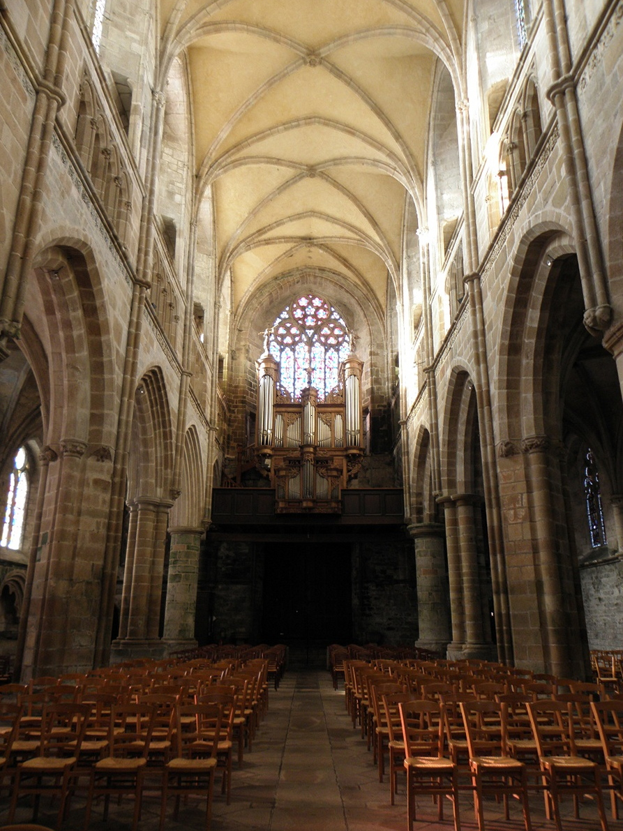 Nef et Grandes-Orgues de la cathédrale Saint-Tugdual de Tréguier (22). .